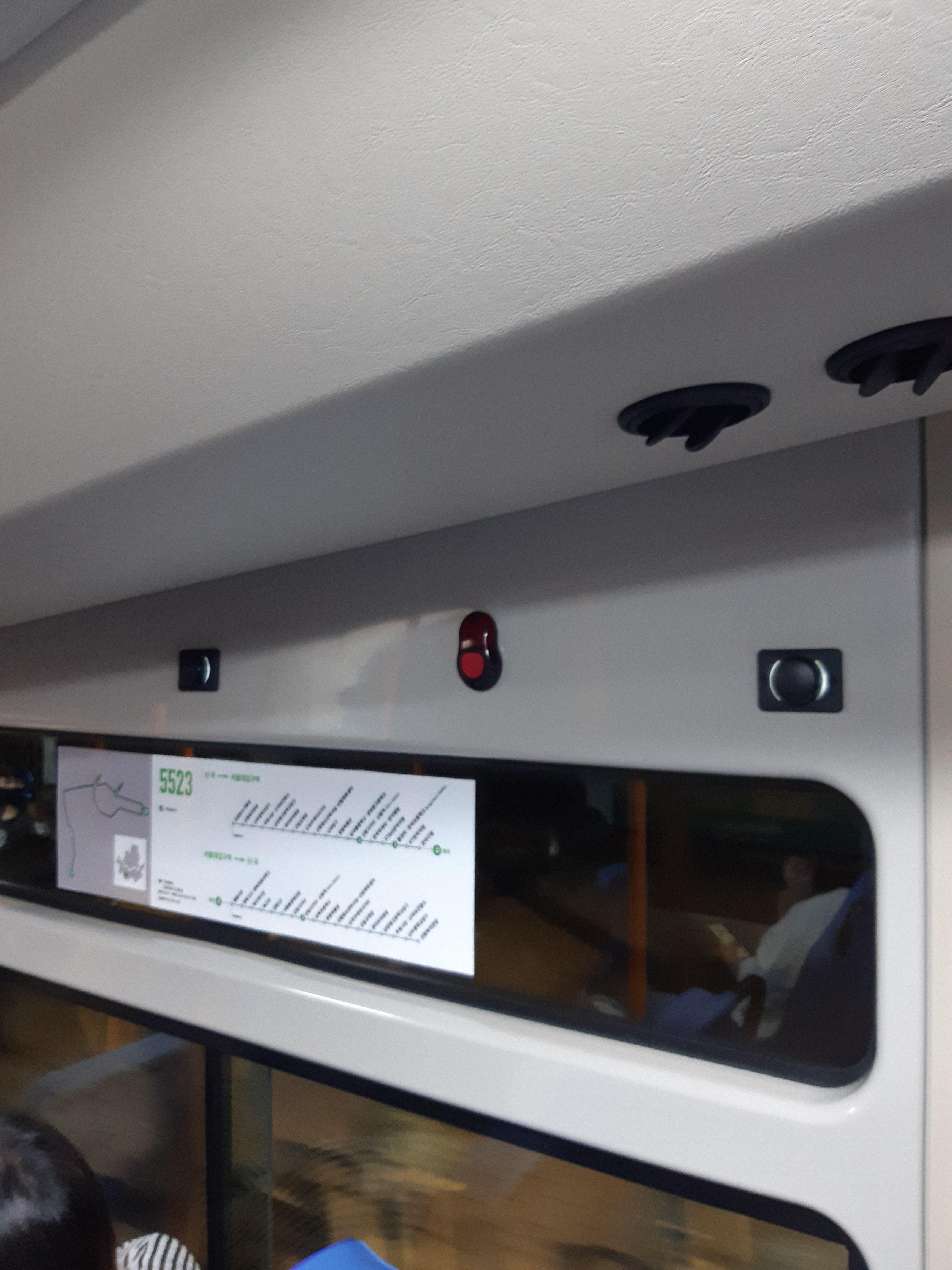 서울특별시의 시내 버스내 휴대폰 충전포트